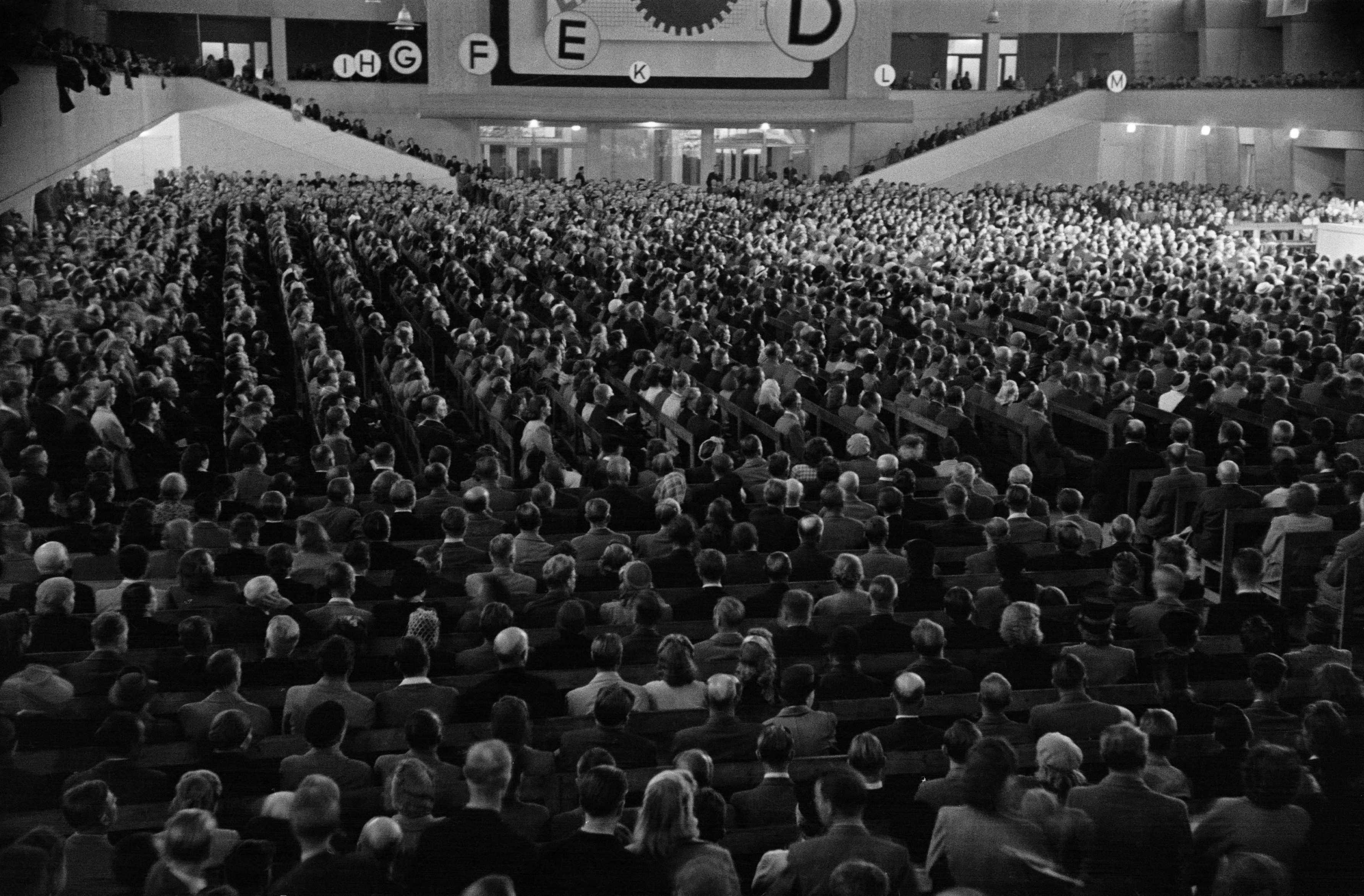 Messuhalli (=Töölön kisahalli), Suomen Kommunistisen Puolueen (SKP) 29-vuotisjuhla. 29.8.1947.